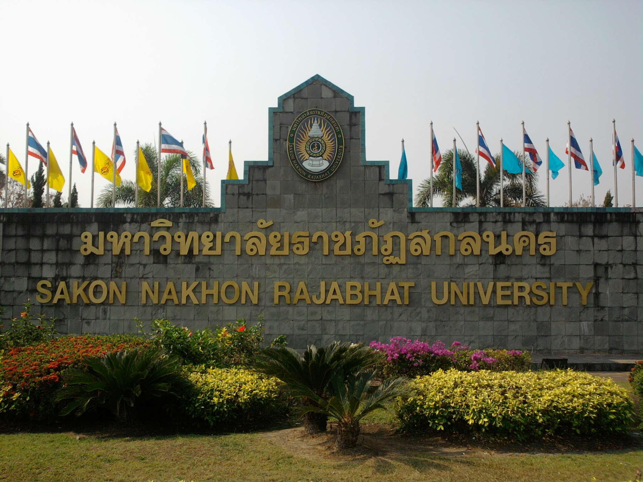 มหาวิทยาลัยราชภัฏสกลนคร